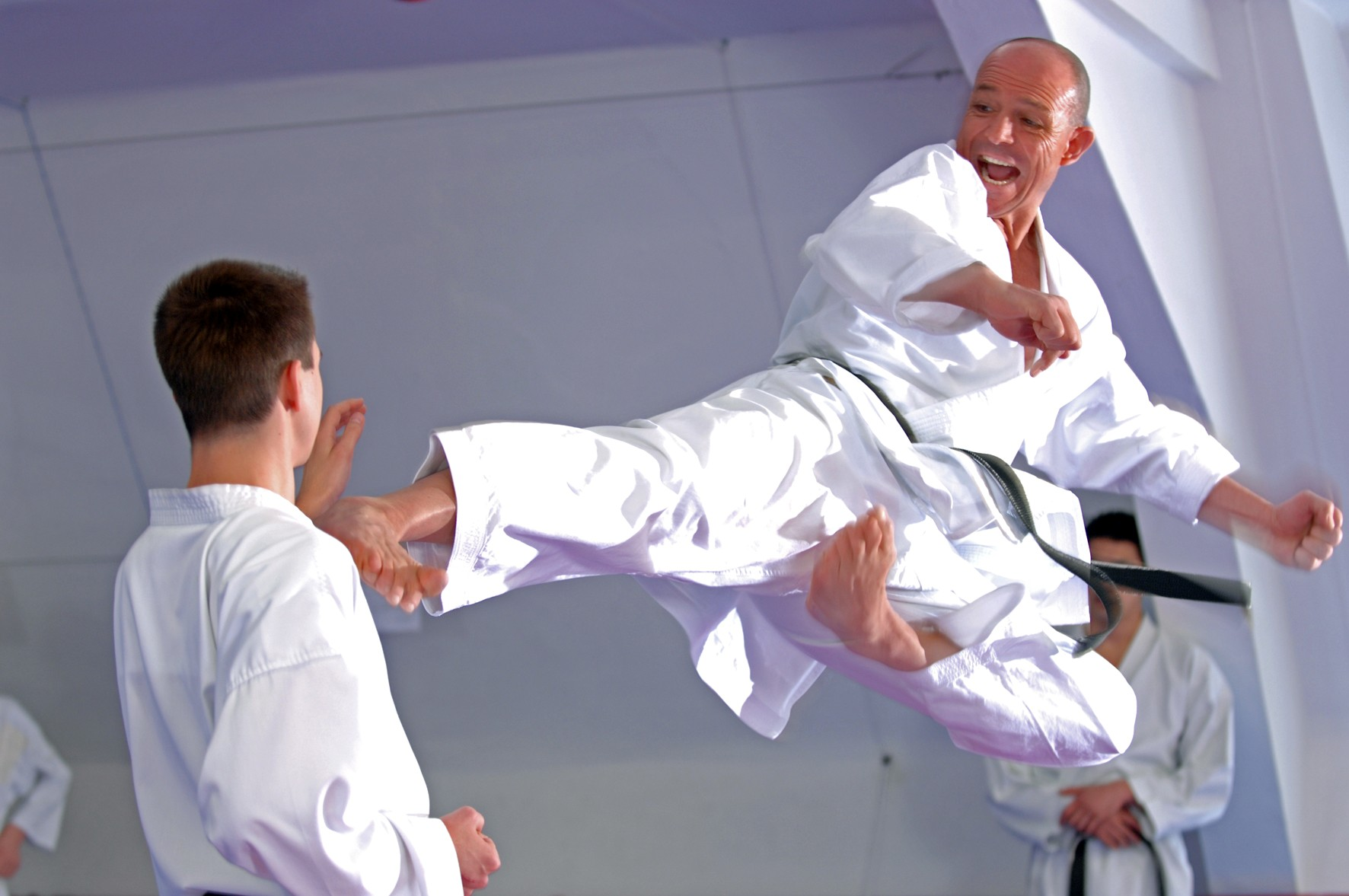 Yoko Tobi wie aus dem Lehrbuch